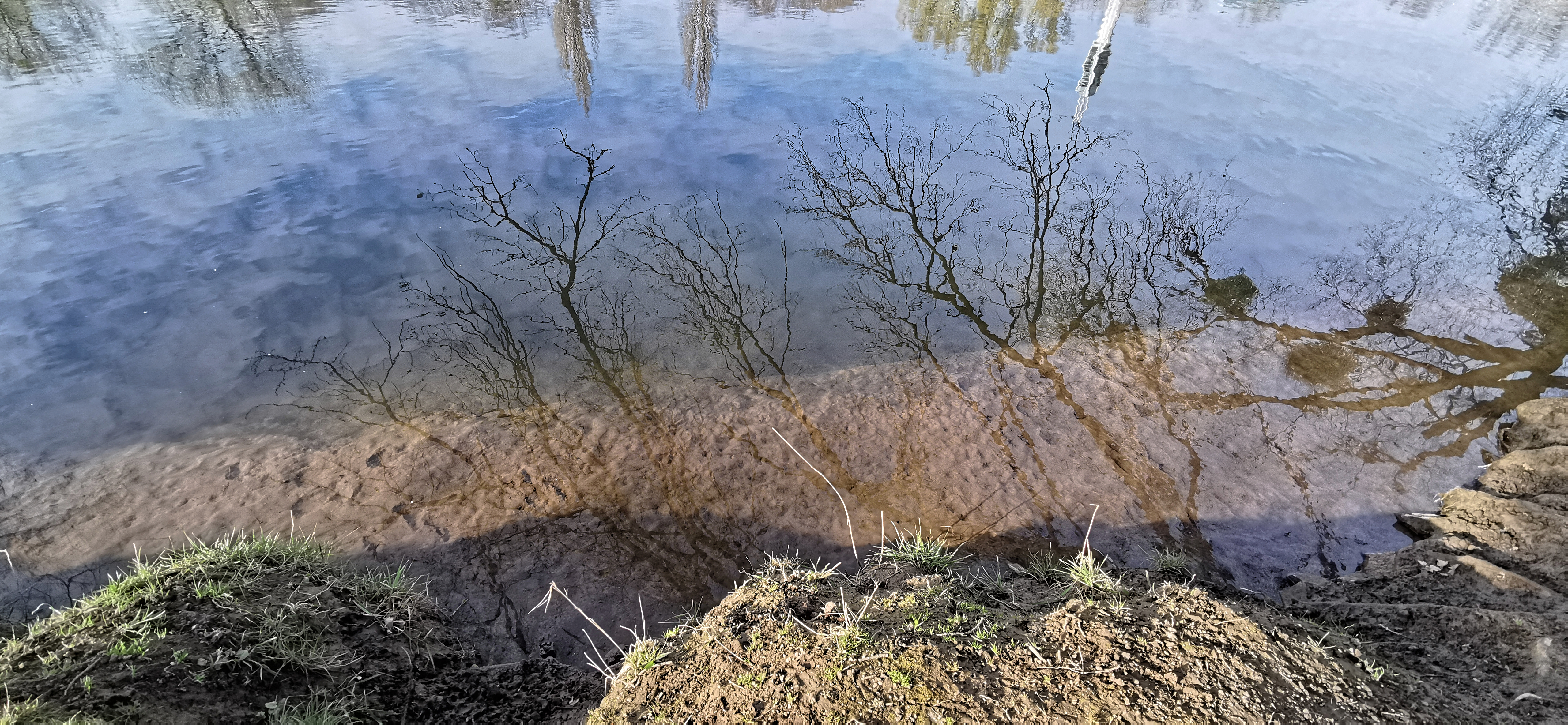 Hannover 2020 -Leine in Hannover